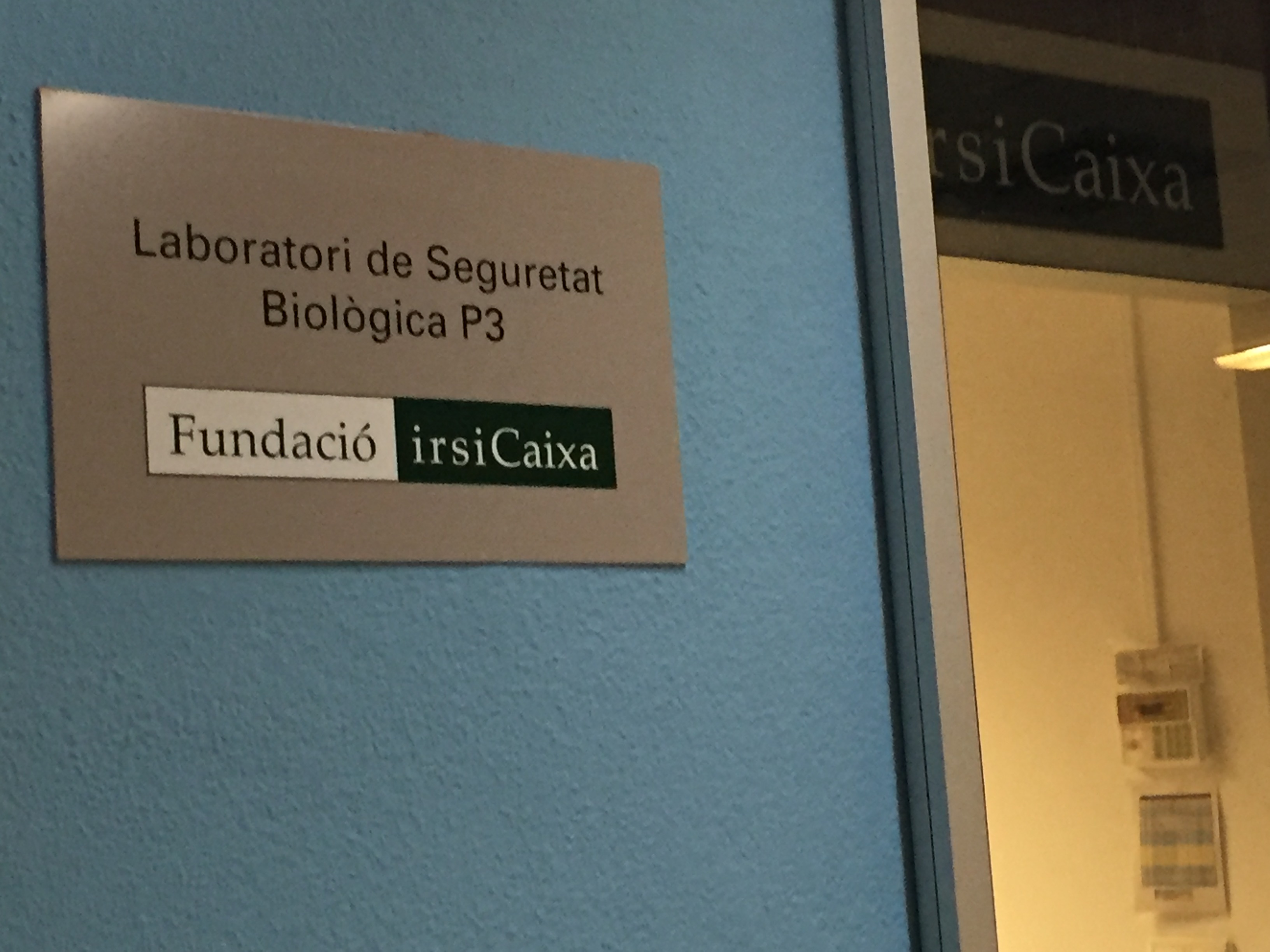 Laboratorio de Seguridad Biológica P3 IrsiCaixa